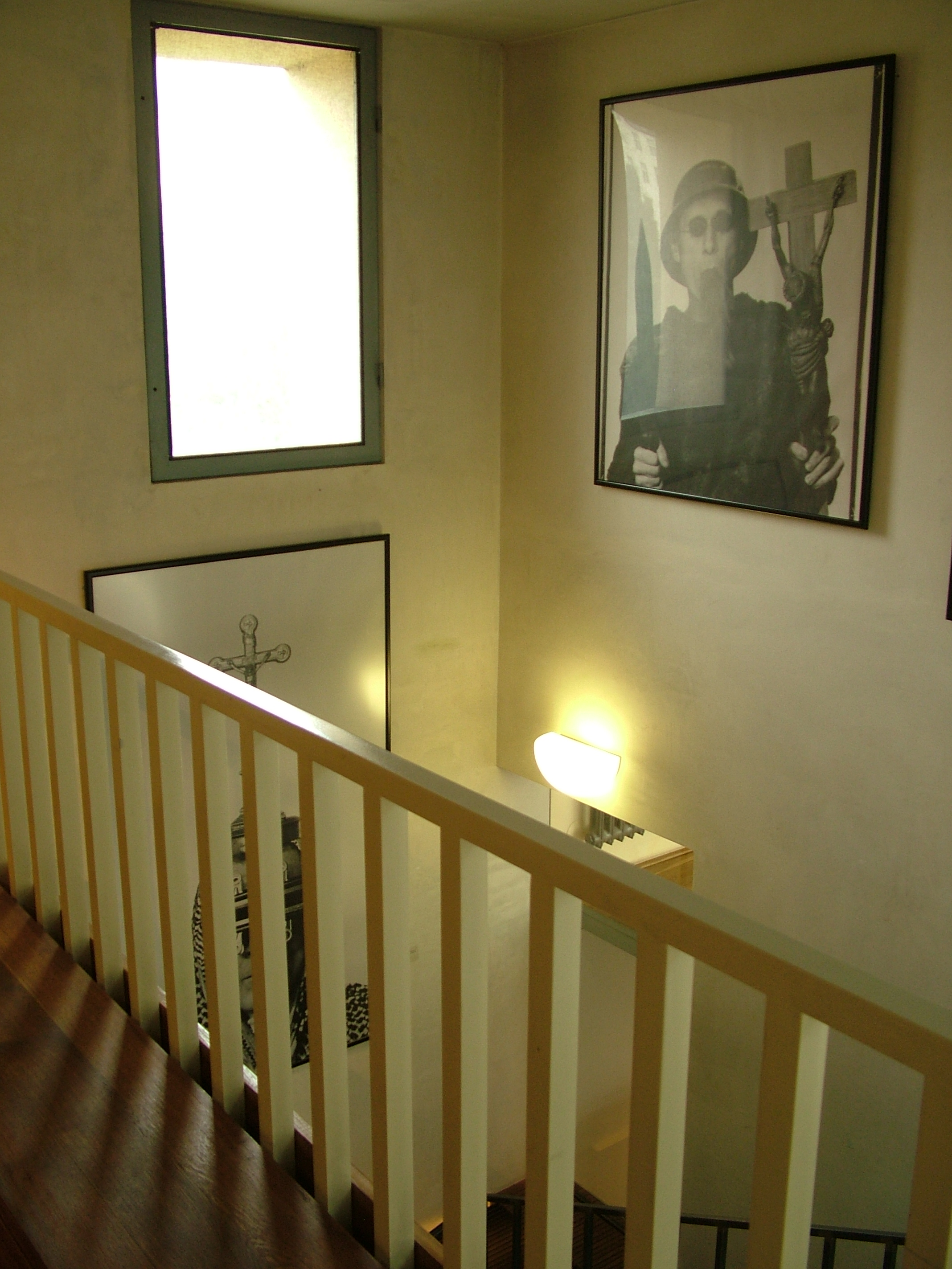 Václav Stratil, výstava Langhans Galerie Praha, červenec 2010